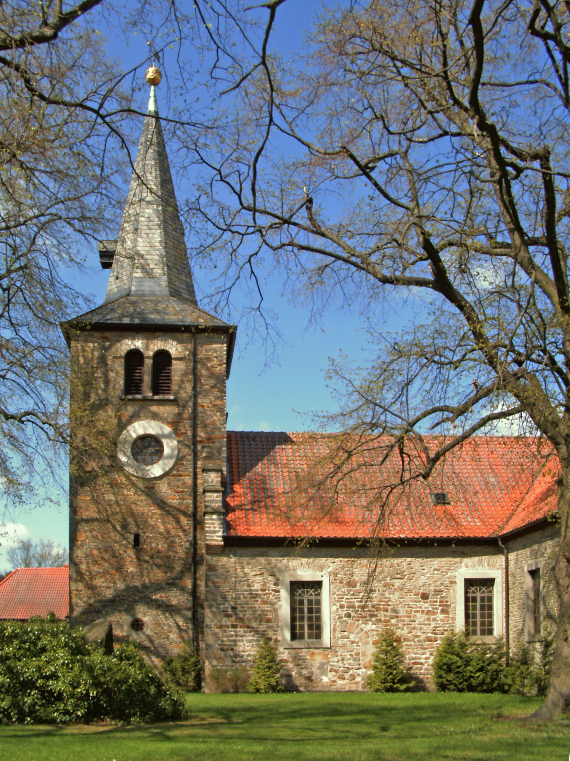 Evangelisch-lutherische Johannes-Baptista-Kirche in Saalsdorf, Landkreis Helmstedt.